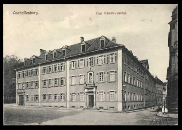 Institut Beatae Mariae Virginis, der Englischen Fräulein am Marktplatz (im 2.Weltkrieg zerstört)